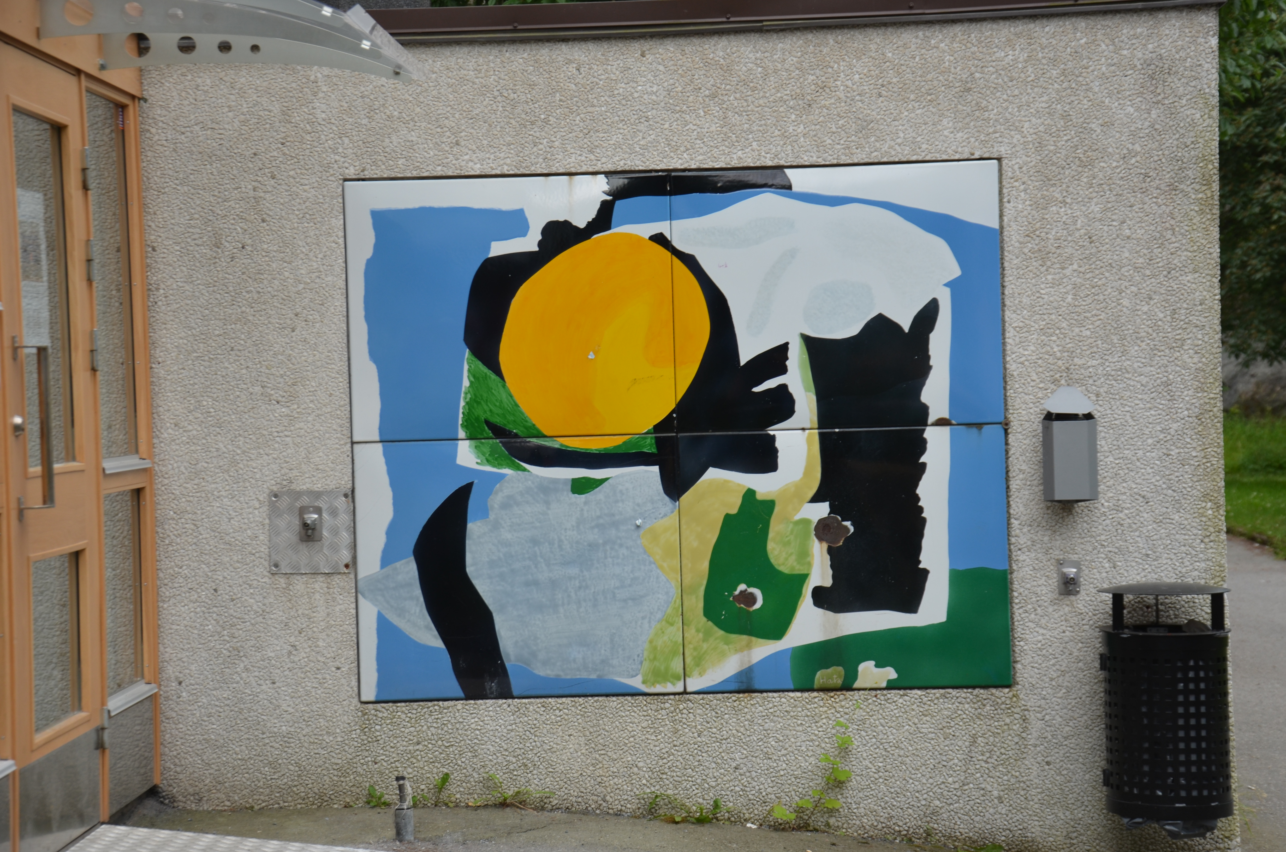 Ballongen på Ullaredsegränd 16 i Östberga i Stockholm av Felix Hatz